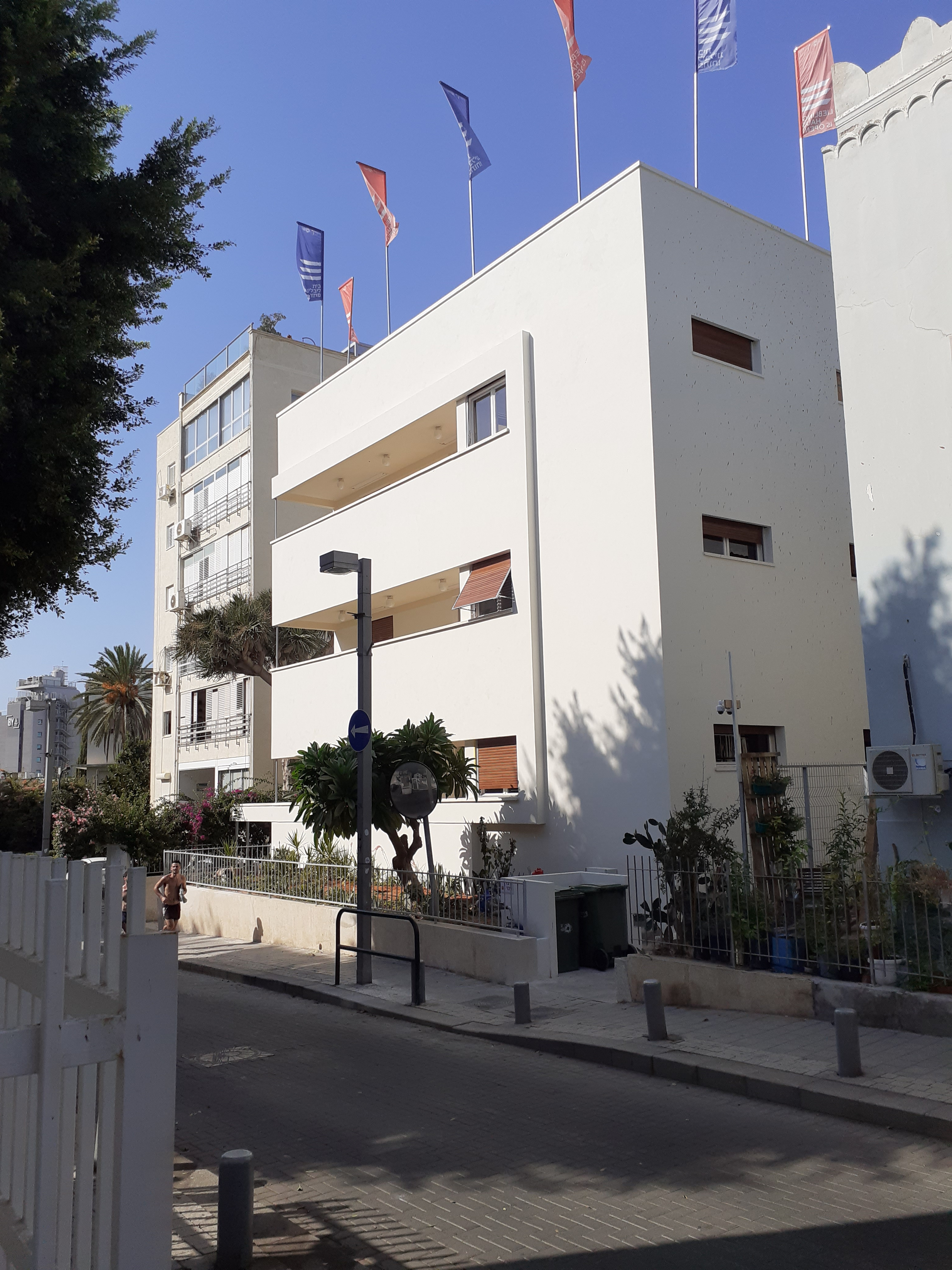 Der Beit Liebling (בֵּית לִיבְּלִינְג) / das Lieblinghaus von Osten durch den Rechov Idelson blickend, Quartier Bialik, Tel Aviv-Jaffa